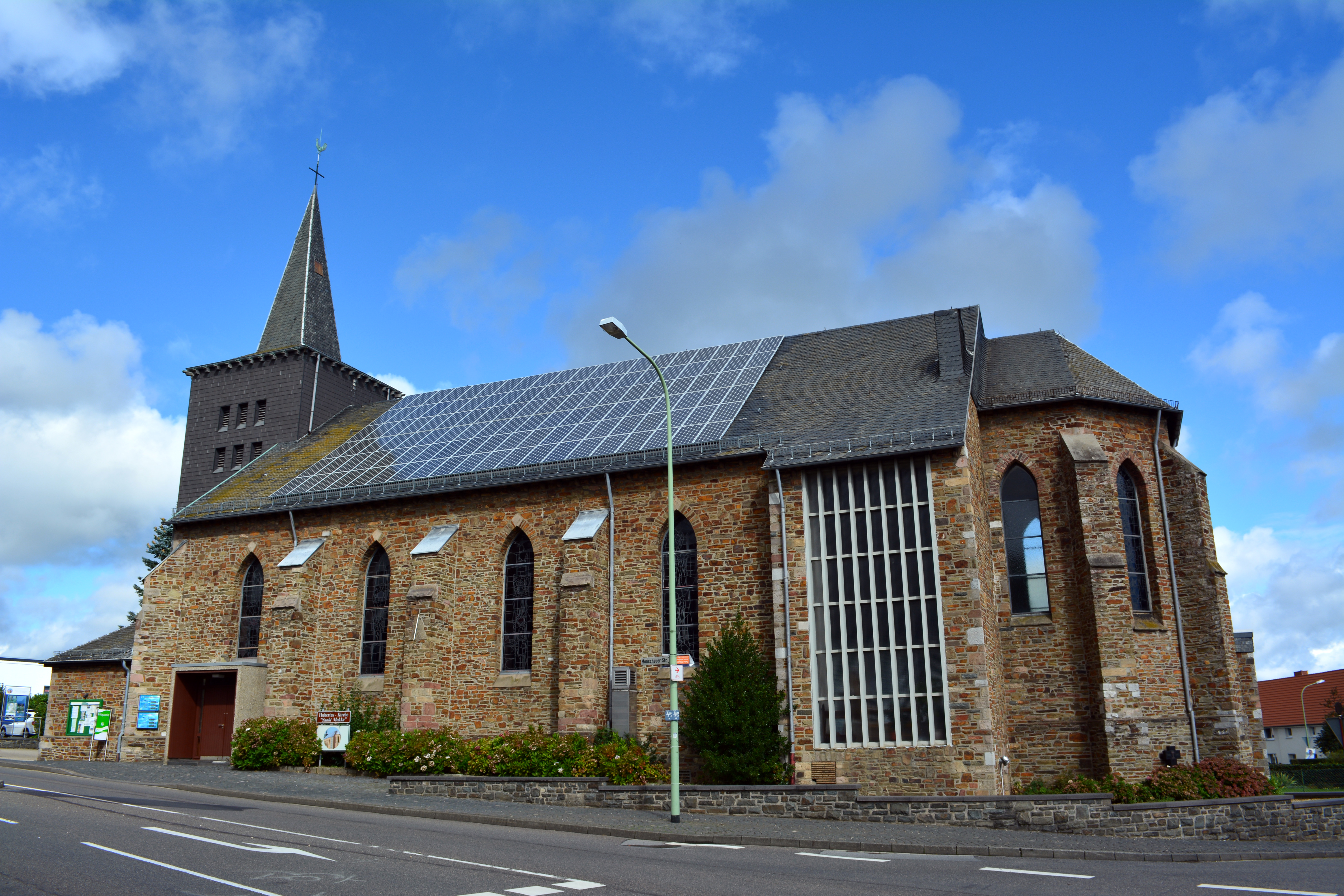 Kath. Pfarrkirche St. Hubertus, Nideggen - Schmidt